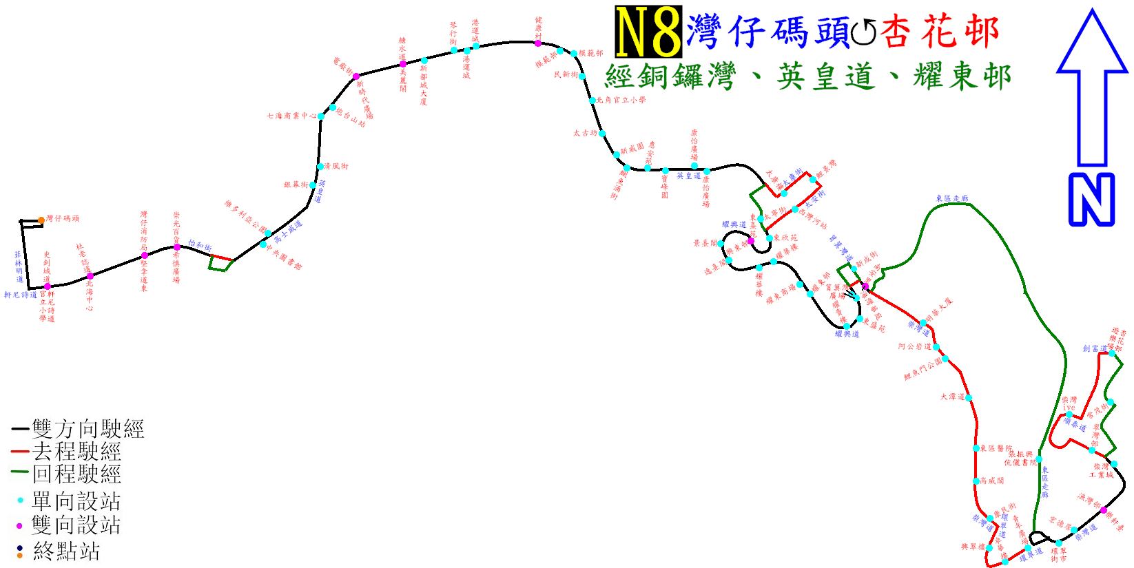 中文（香港）: 新巴N8線的走線圖